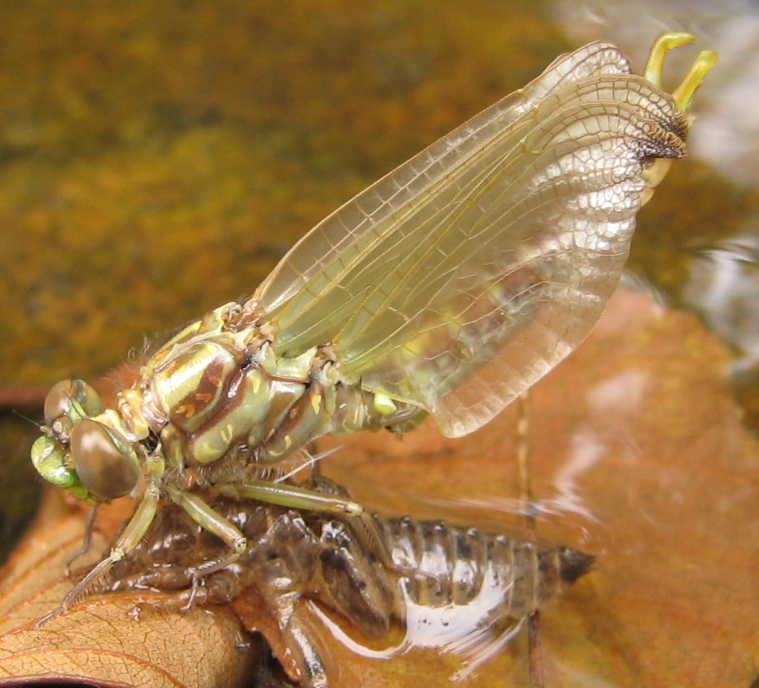 Odonato en el río Agüera (aguas abajo del Puente de Gándaras, en el barrio El Puente, en Guriezo).